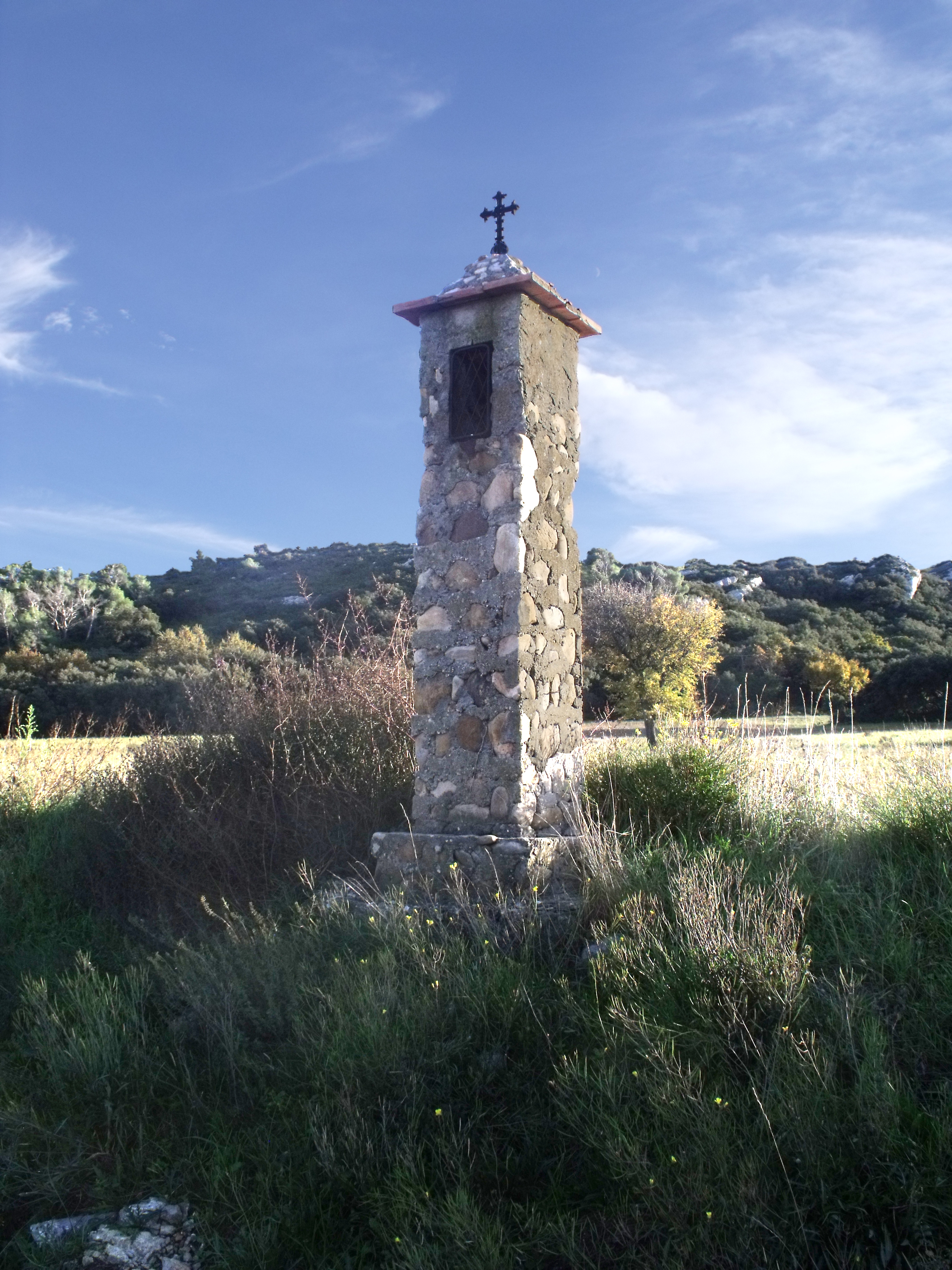 Oratoire Saint-Pierre. Eyguières (Bouches-du-Rhône).